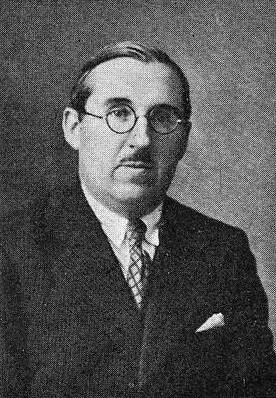 Eugenio López Aydillo, fotografía en Vida Gallega 1934